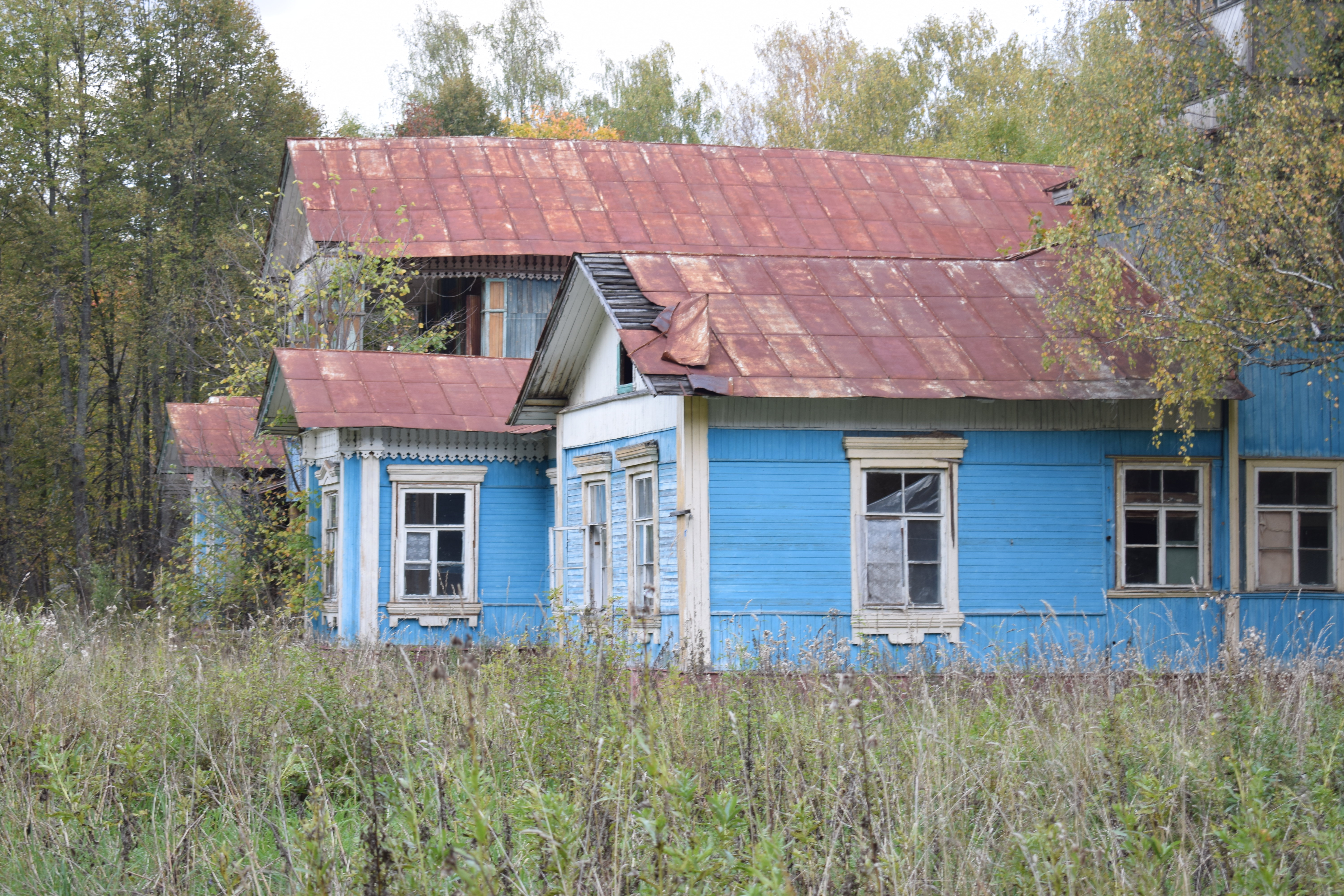 Общий вид дачи Ф.И. Шаляпина (1912-1914 гг.; перестроена в 1923 г.)